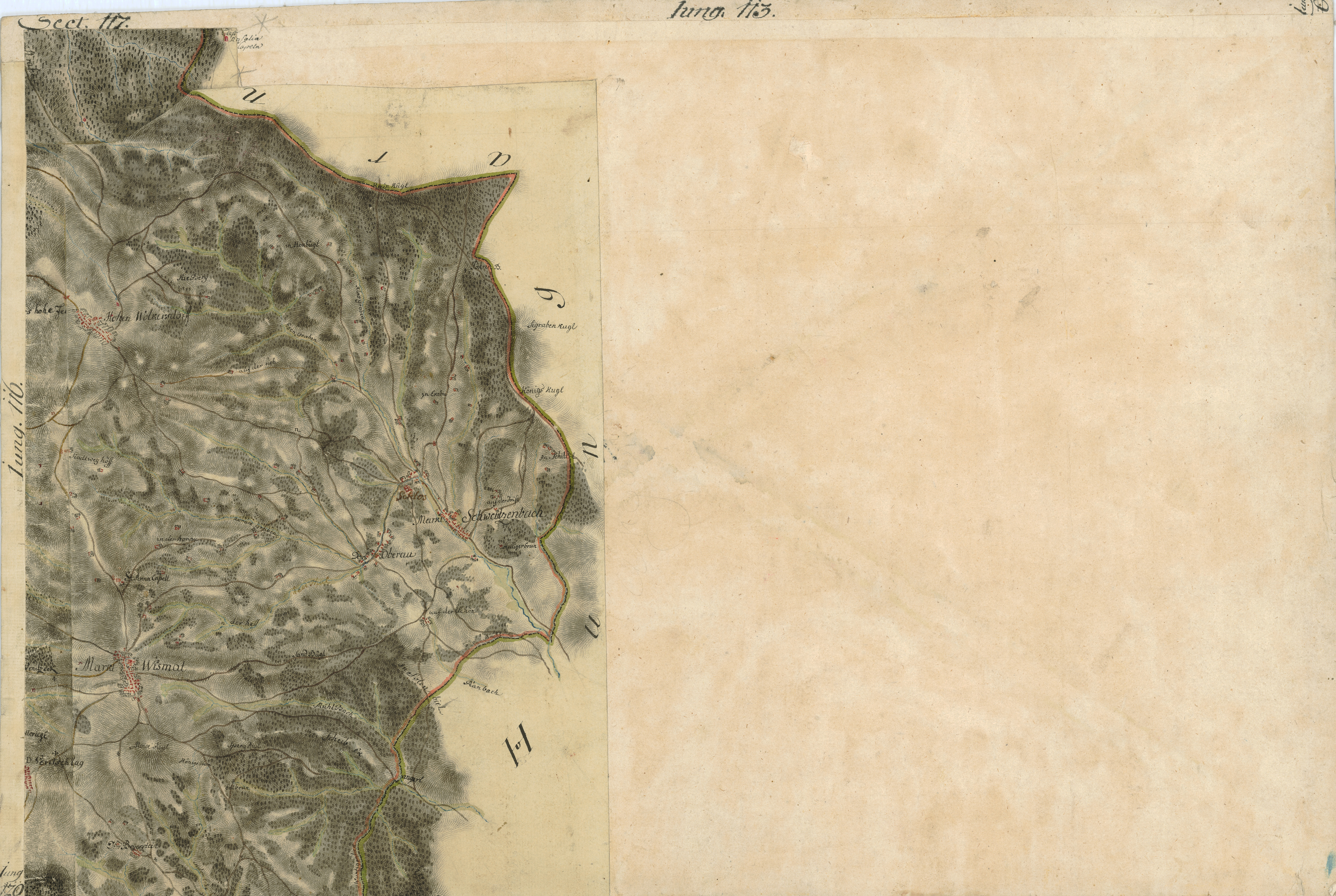 historische Landkarte BIXa242 sect.117 Josephinische Landesaufnahme: Wismath, Bucklige Welt, Niederösterreich, Österreich